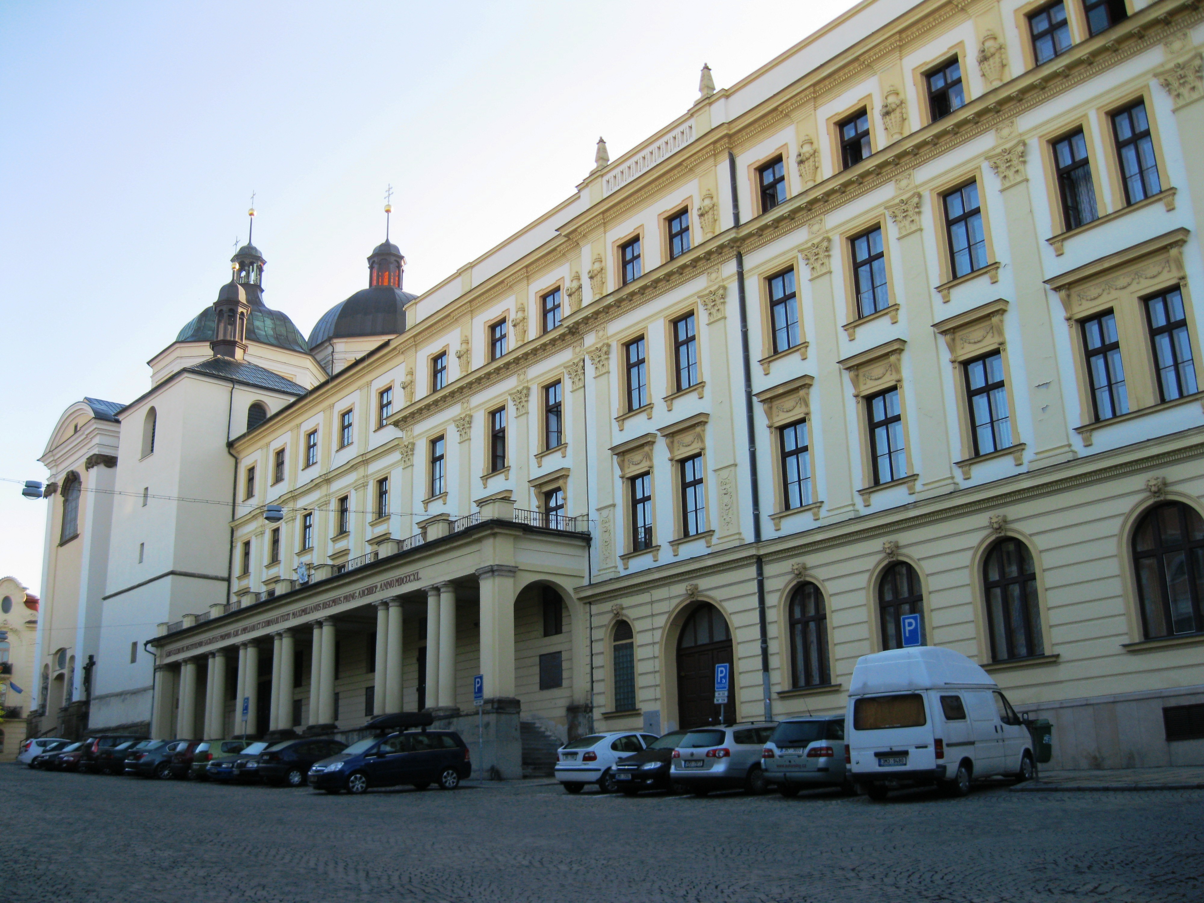 Klášter dominikánský (Olomouc), Žerotínovo nám. 220/1, Olomouc